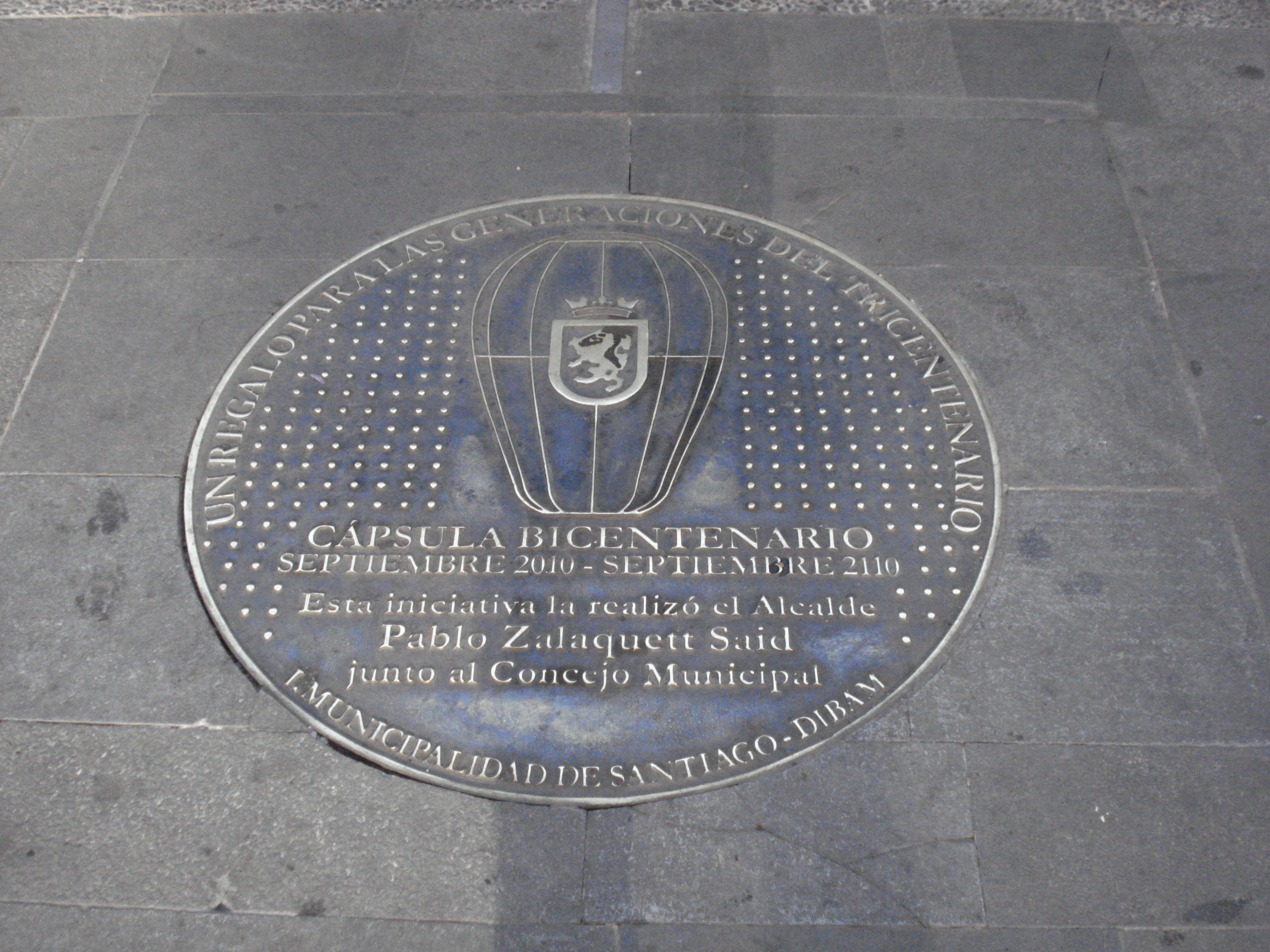 Tapa que cubre la Cápsula Bicentenario enterrada en Plaza de Armas en el año 2010.